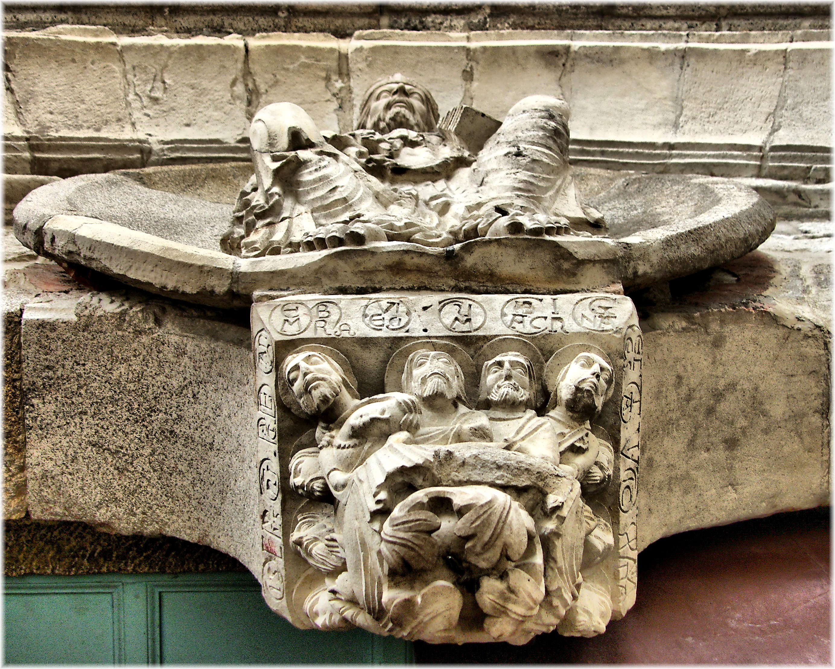 Pantocrátor sedente con pinxante en forma de capitel representando a Última Cea. (Século XII)